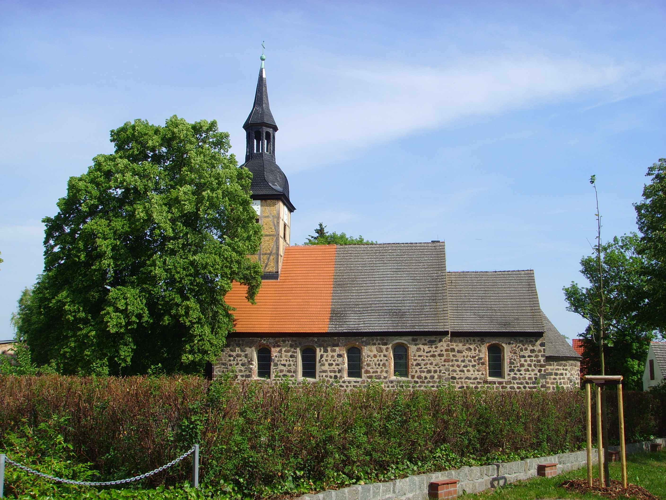 Nikolai-Kirche in Steckby, Ortsteil von Zerbst/Anhalt